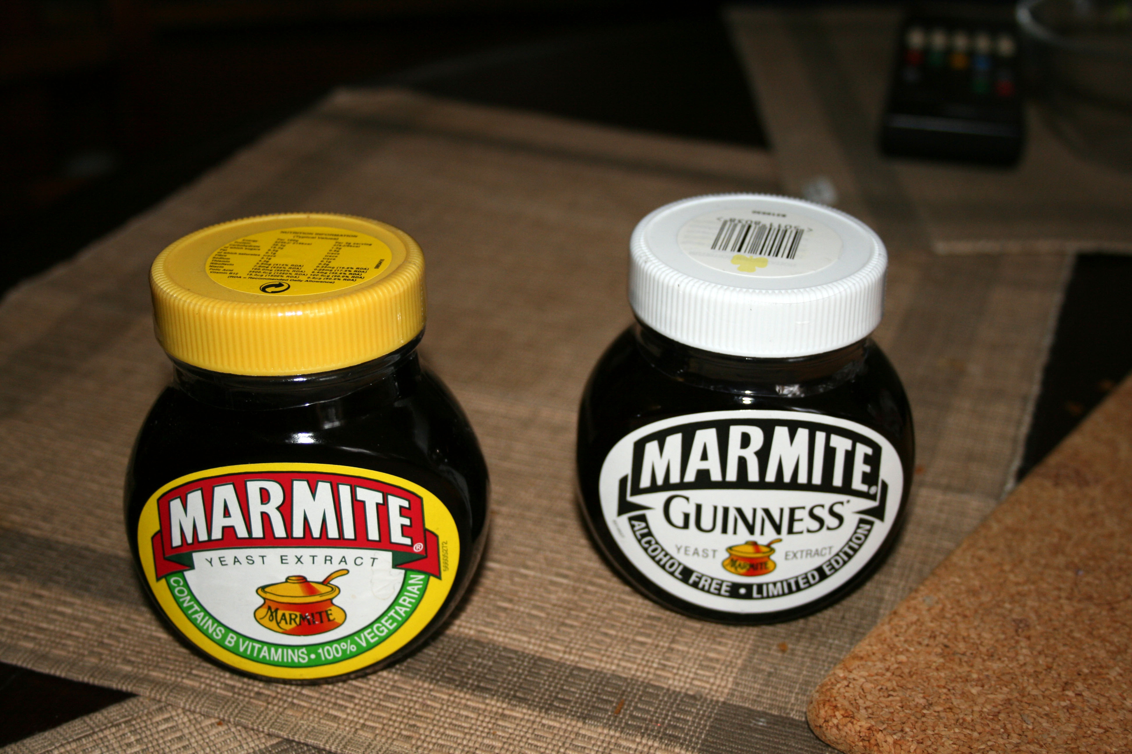 Marmite Guinness Edition